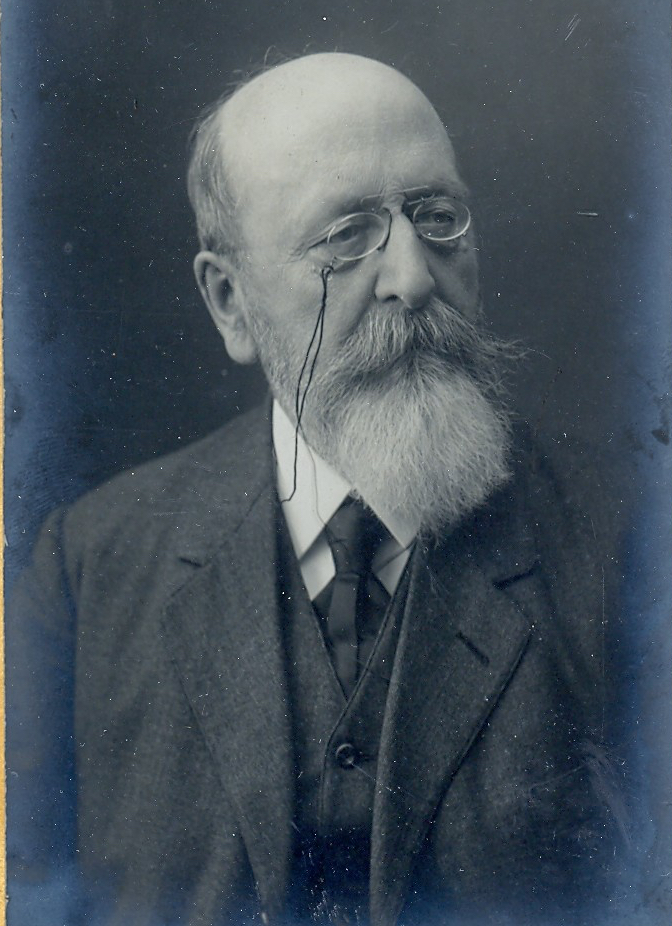 Portrait de l'historien et linguiste français Amédée de Caix de Saint-Aymour (1843-1920).